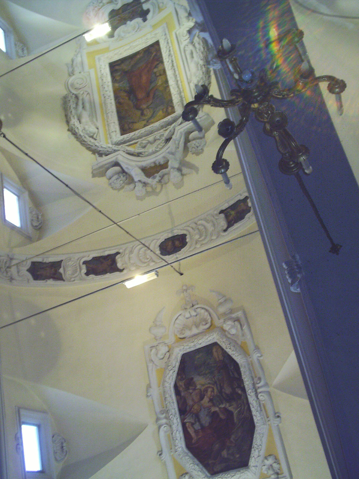 Volta della navata centrale della chiesa della Madonna della Valle a Scanno, L'Aquila